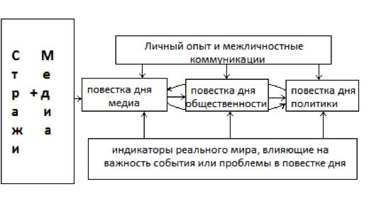 Пример повестки дня